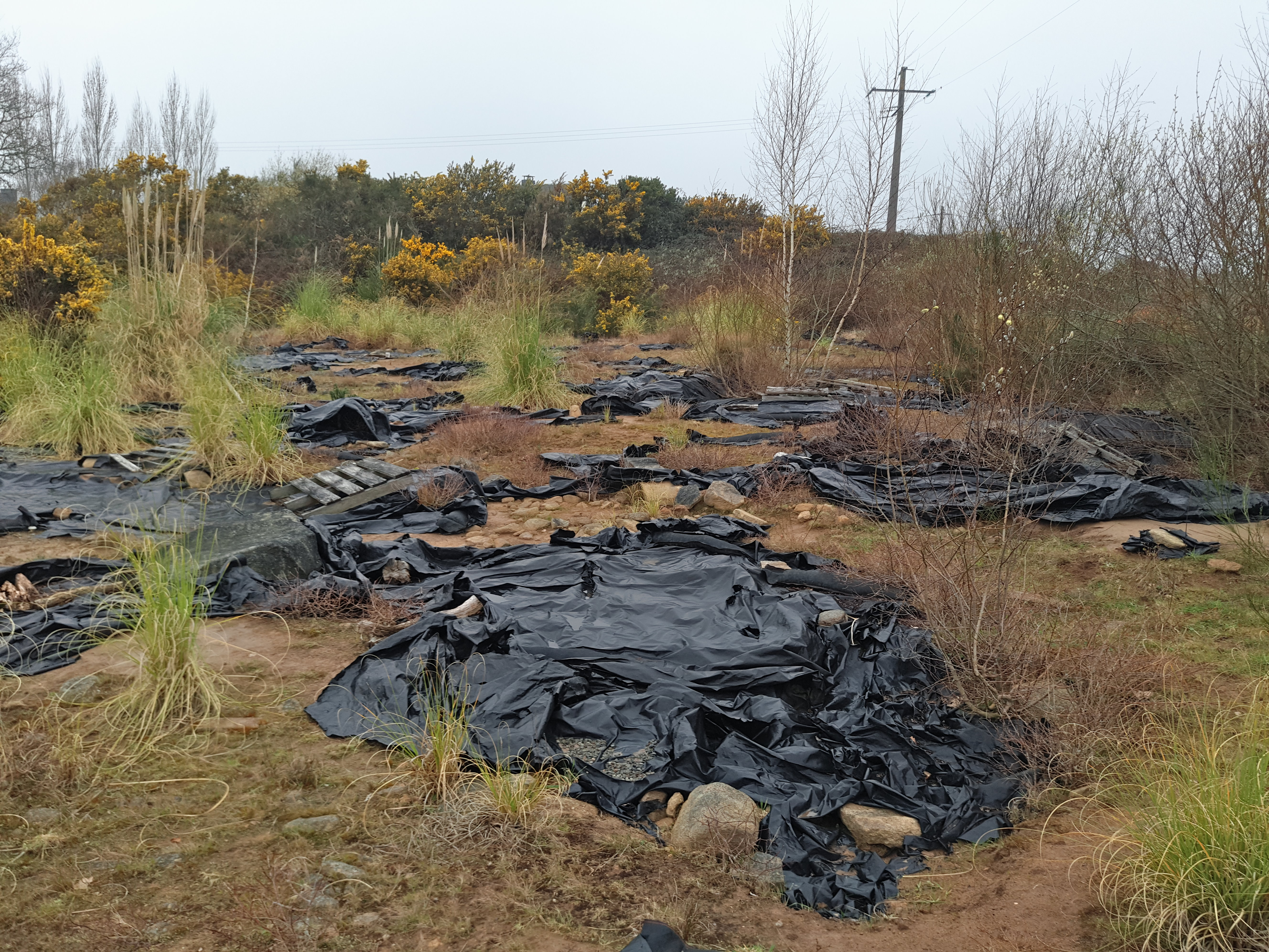 Alignement de Kerdruellan à Belz. Des bâches de protection (?) volent aux vents.